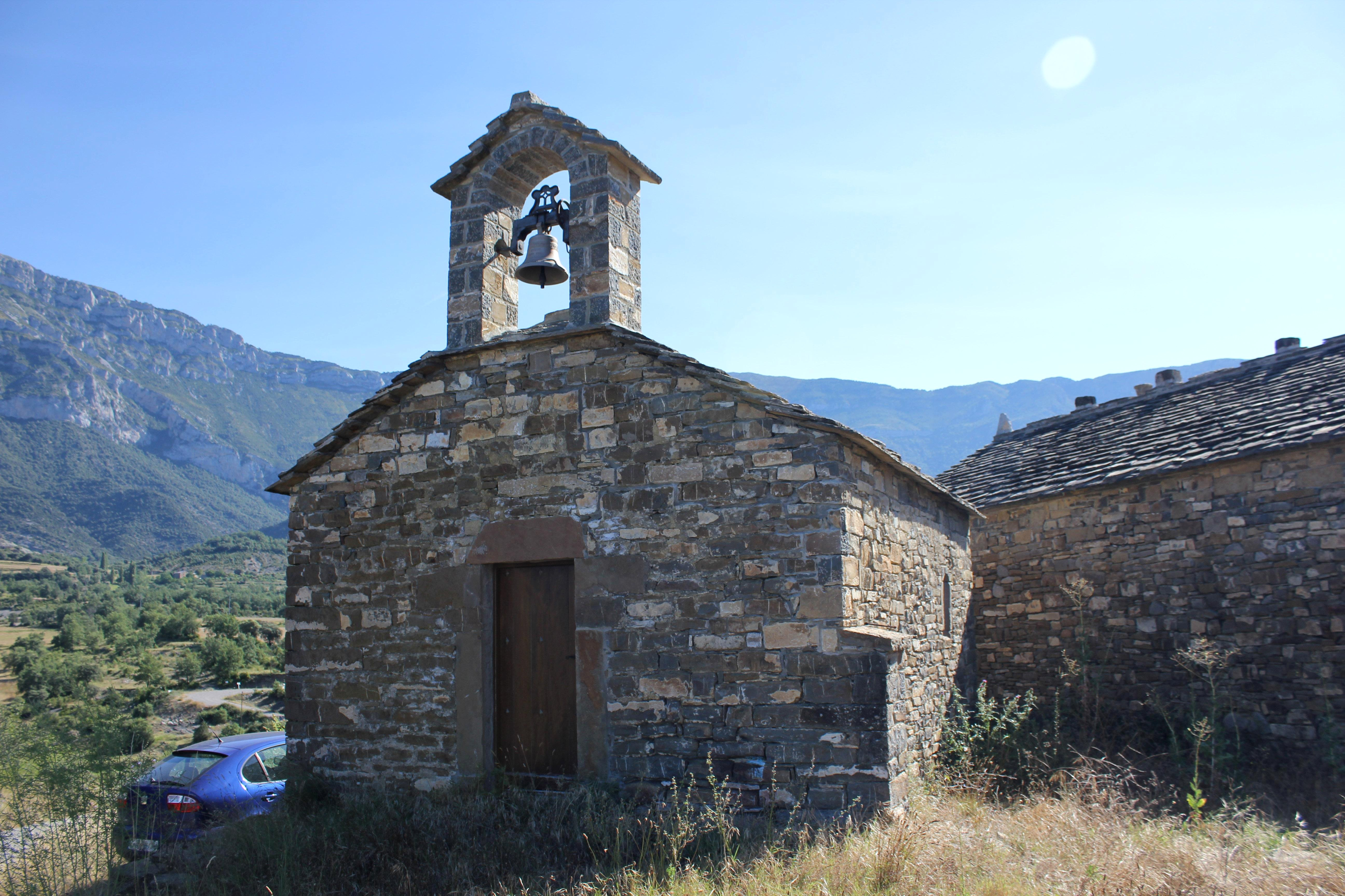 Aragonés: Capilleta en L'Atiart (A Fueva)